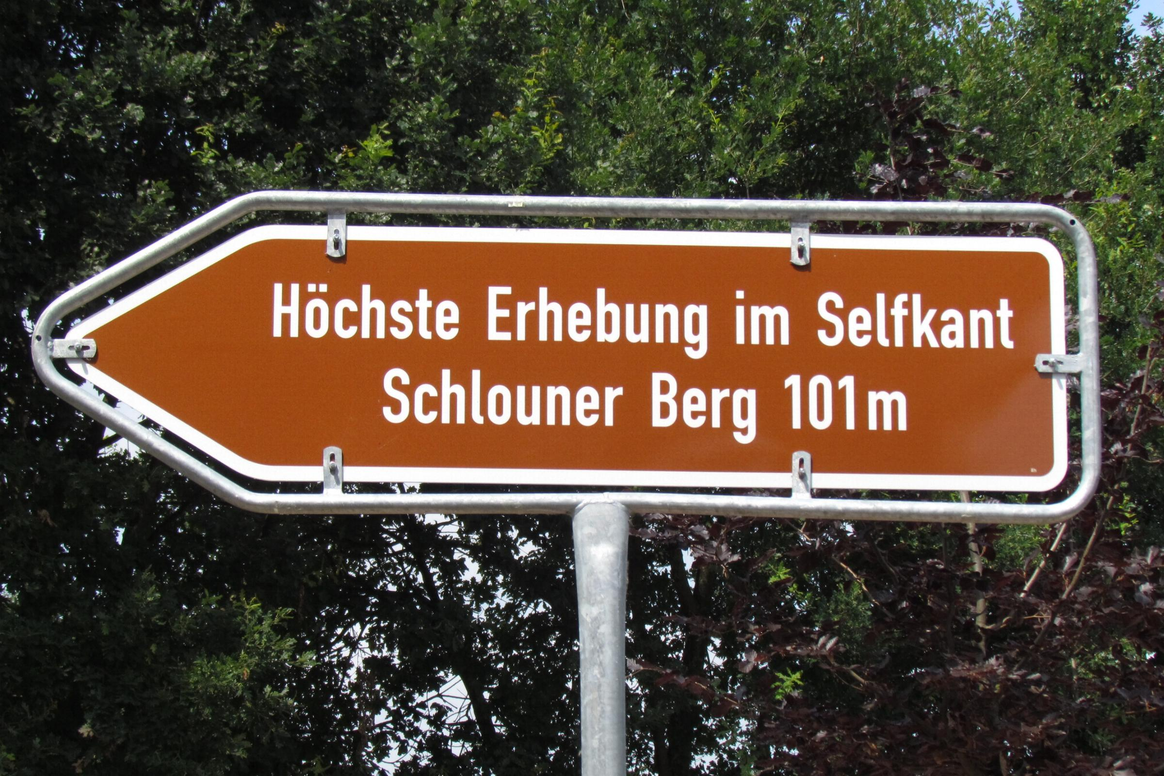 Hillensberg Höchster Berg